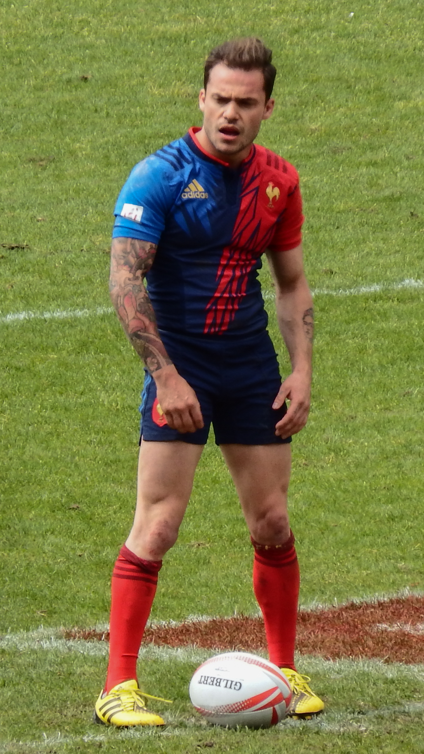 Paris Sevens 2016 — 14 May 2016, stade Jean-Bouin. Match between: Argentina — France